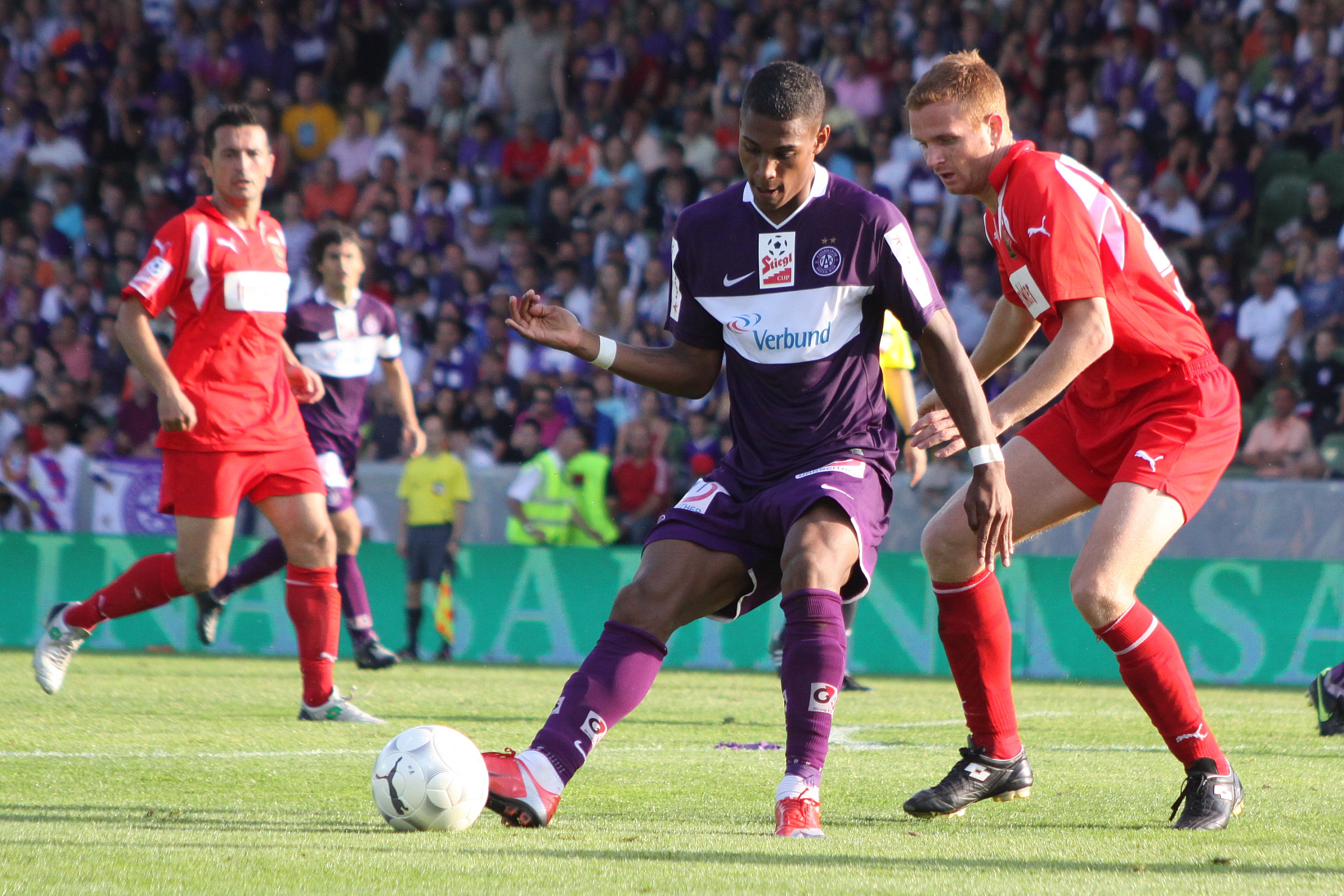 Finale im Österreichischer Fußball-Cup 2008/09 - FC Admira Wacker Mödling gegen FK Austria Wien: Austrias Rubin Okotie verfolgt von Michael Horvath